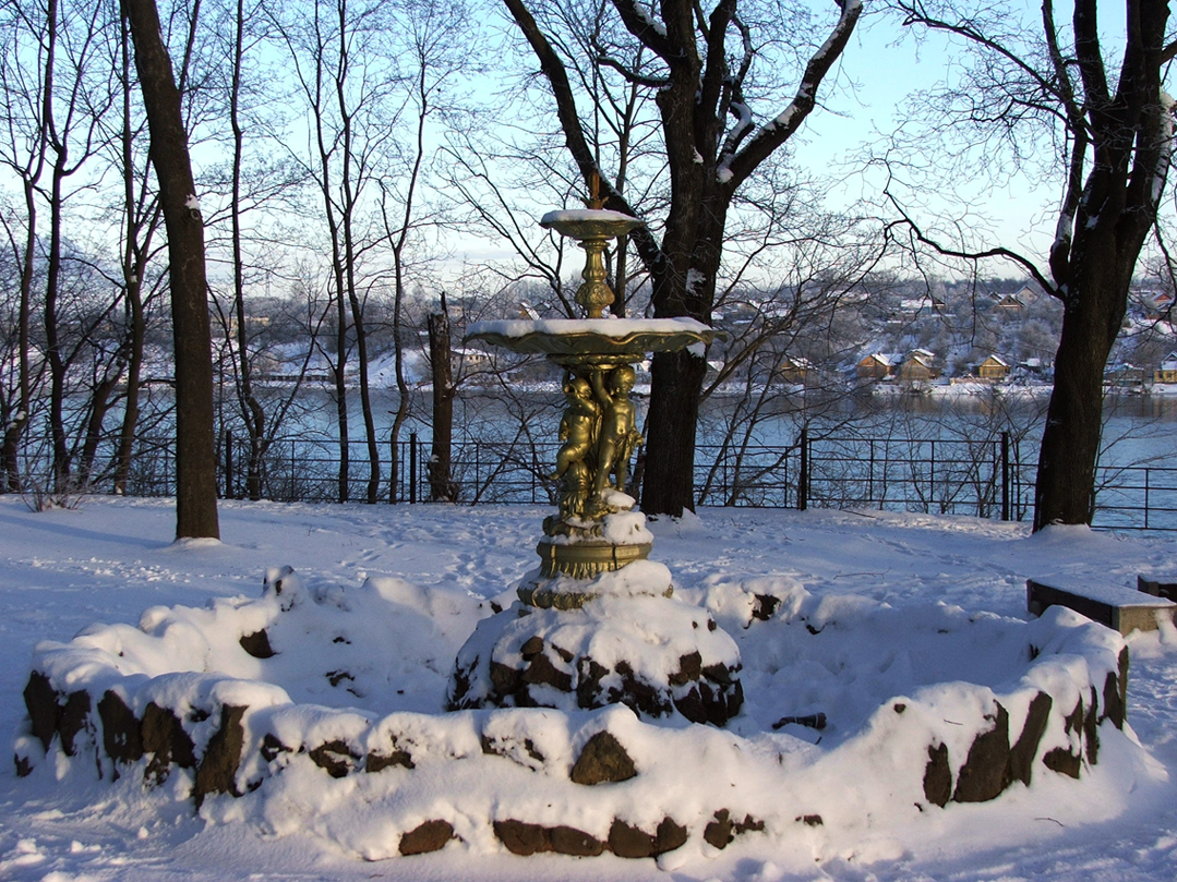 Фонтан в Нарве на бастионе Пакс